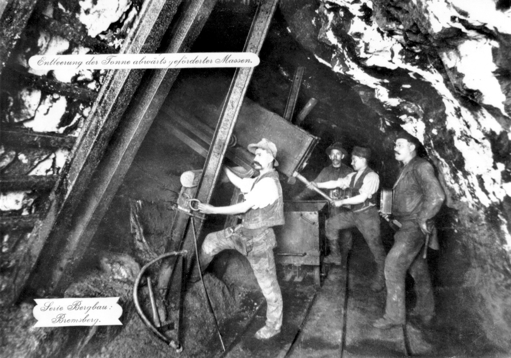 Bremsberg